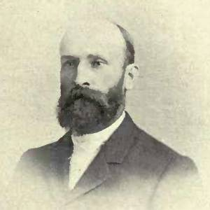 Dilman Kinsey Erb